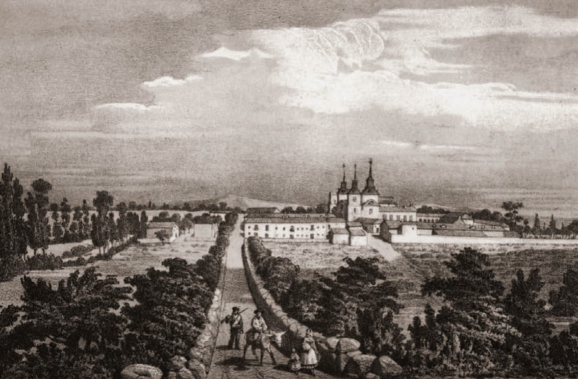 Vista general del Lugar de Nuevo Baztán Madrid , fundado por Juan de Goyeneche, grabado anónimo de mediados del siglo XIX.